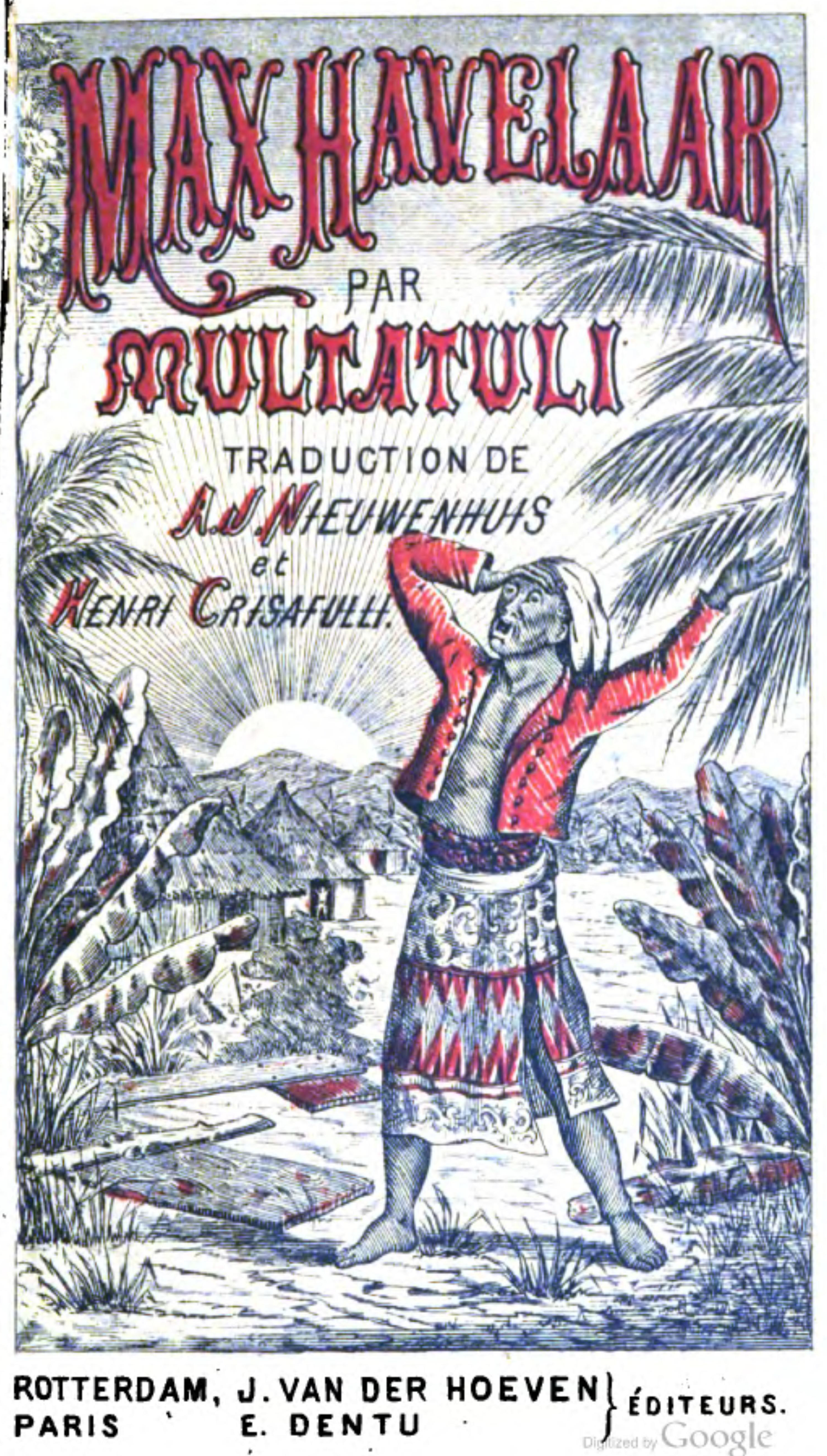 Couverture du roman Max Haavelar de Multatuli, traduction Nieuwenhuis-Crisafuli, Dentu, 1876.